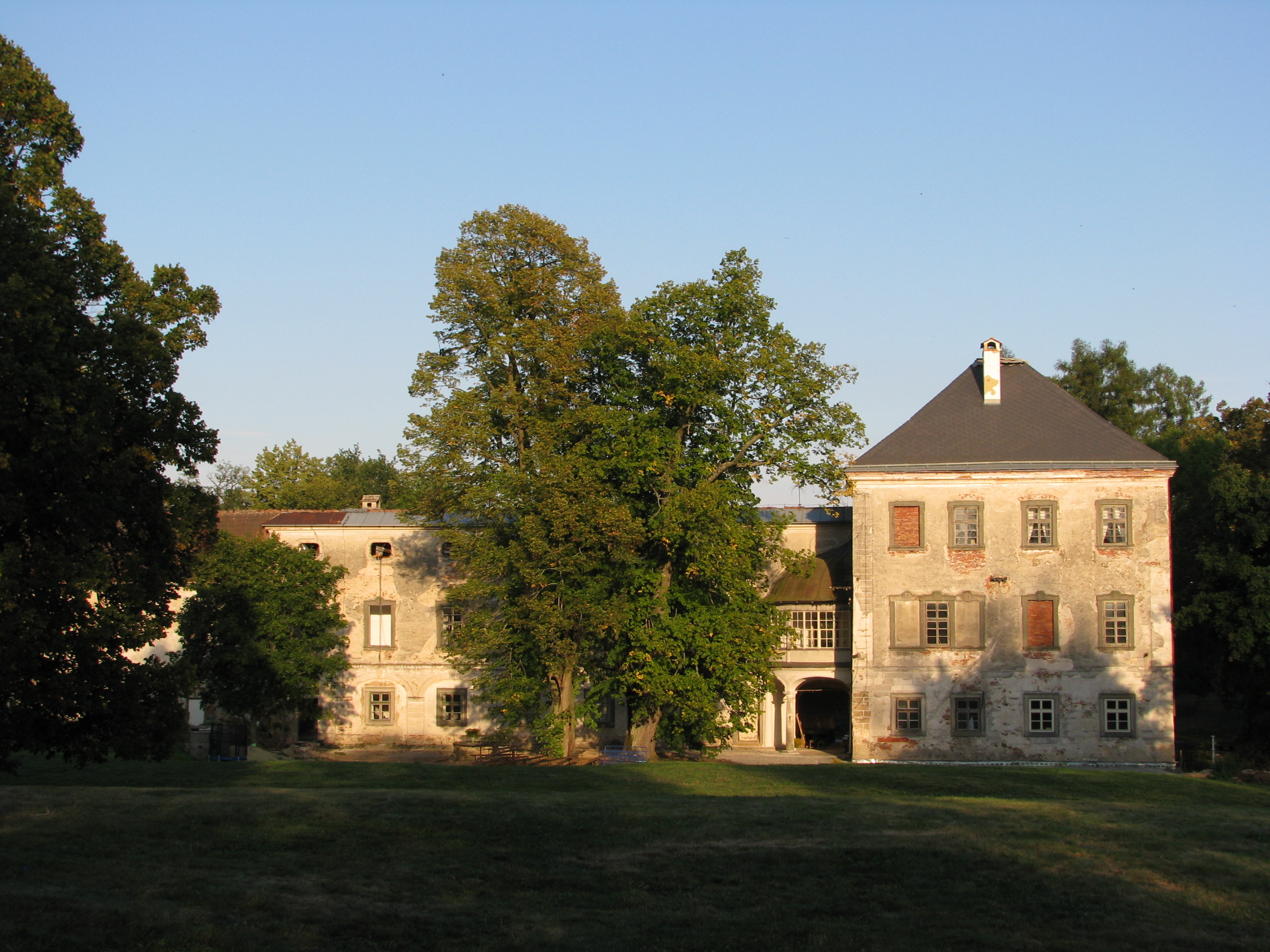 Zámek Radešín, Radešín 1